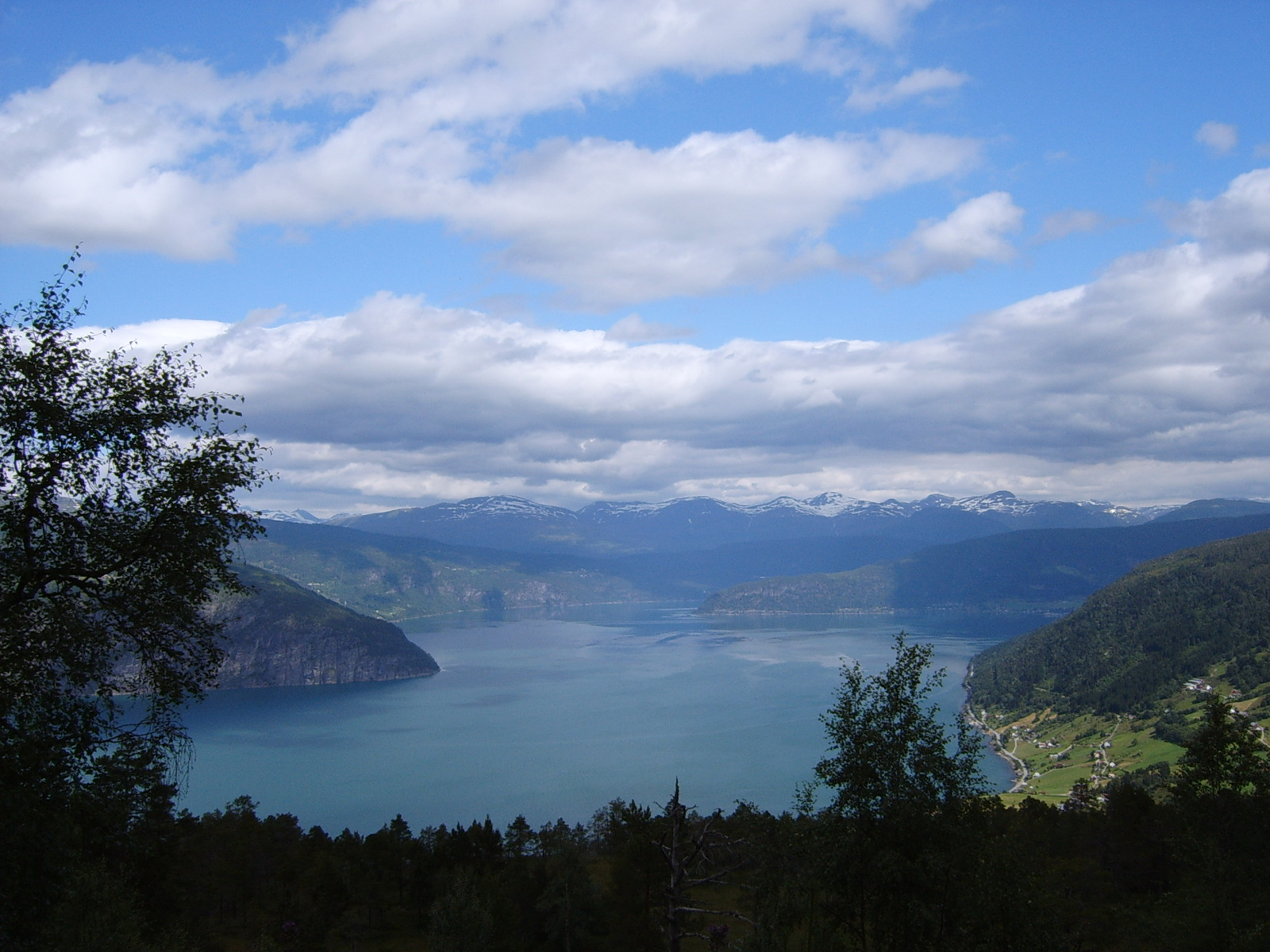 Nordfjord